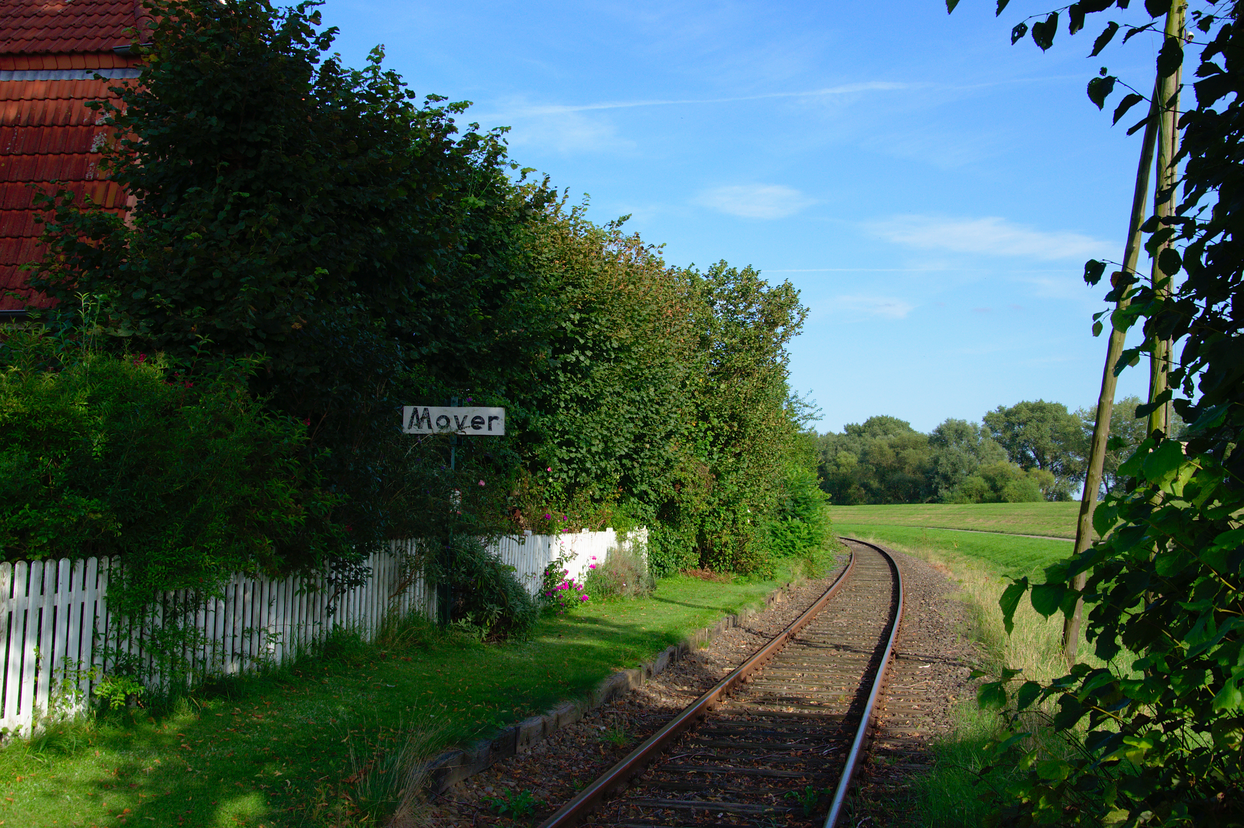 Alter Bahnhof in Mover auf der Strecke Winsen–Niedermarschacht